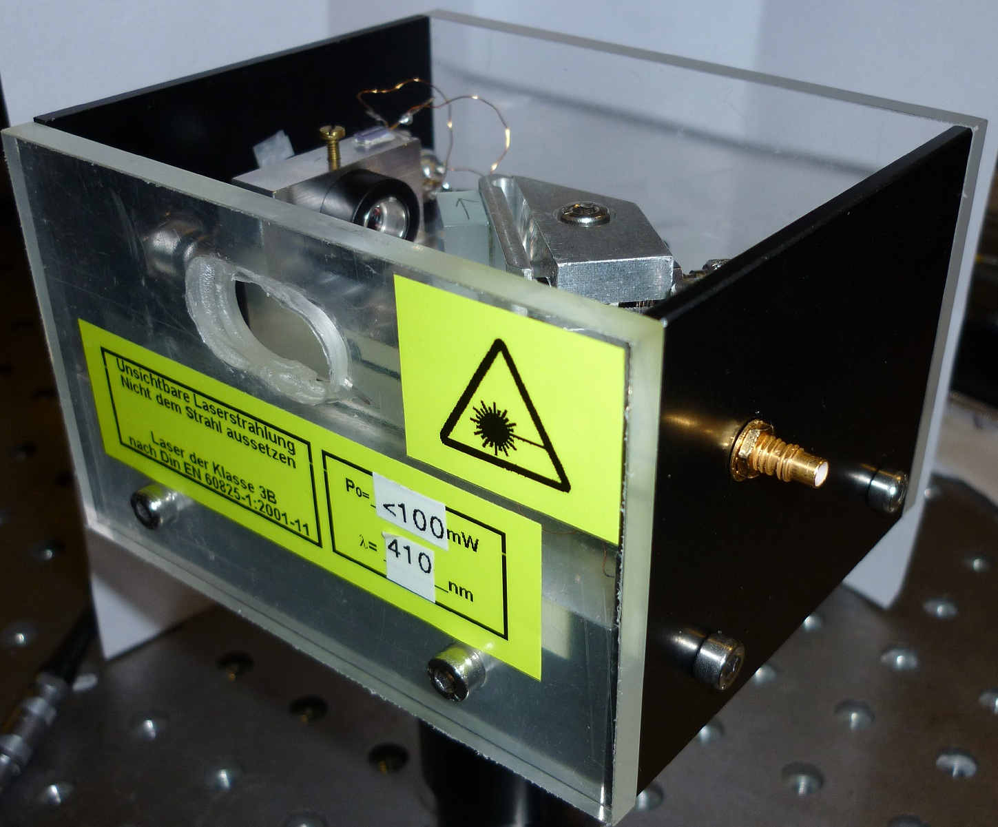 Nach EN 60825-1 klassifizierter Laser